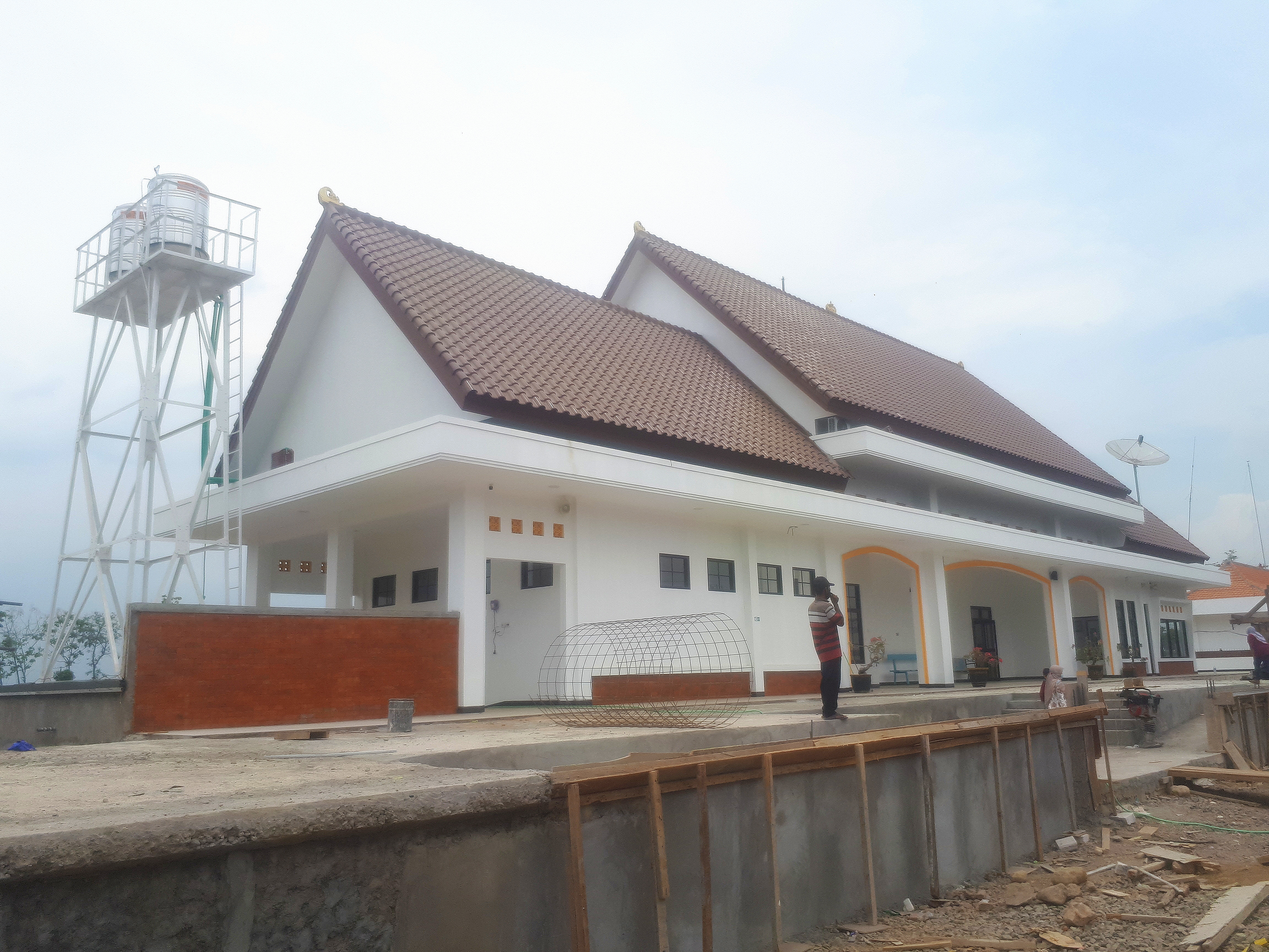 Stasiun Sumobito hingga kini sedang dalam proses pembangunan, rencana aktif bersamaan dengan pengoperasian jalur ganda Jombang-Mojokerto